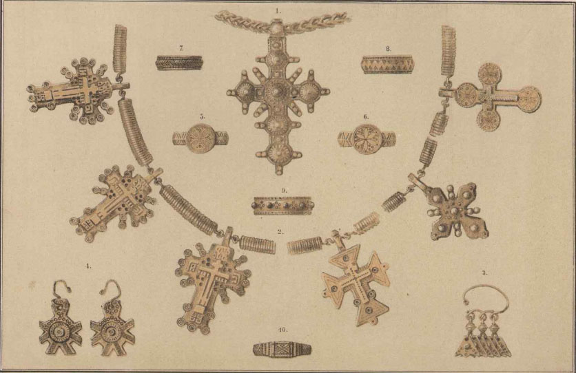 Сторінка з видання "Взори промислу домашнього. Металеві вироби селян на Русі" Табл. ІІ 1 - хрест на рекизях 2 - зґарда хрестикова 3 - ковтки леліткові 4 - ковтки хрестикові 5, 6, 10 - персні 7, 8, 9 - обручки